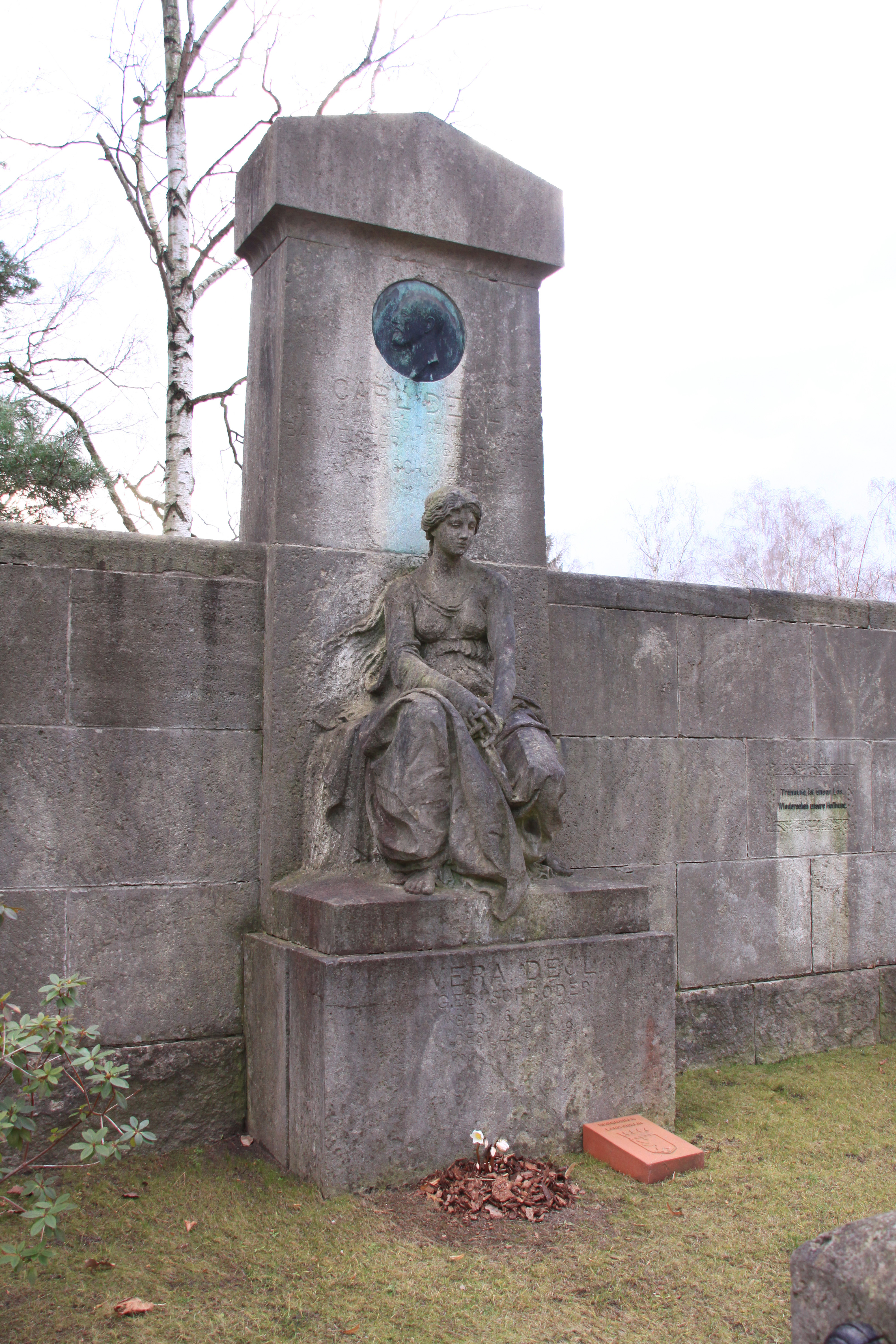 Waldfriedhof Berlin Oberschöneweide, Grabmal Vera und Carl Deul